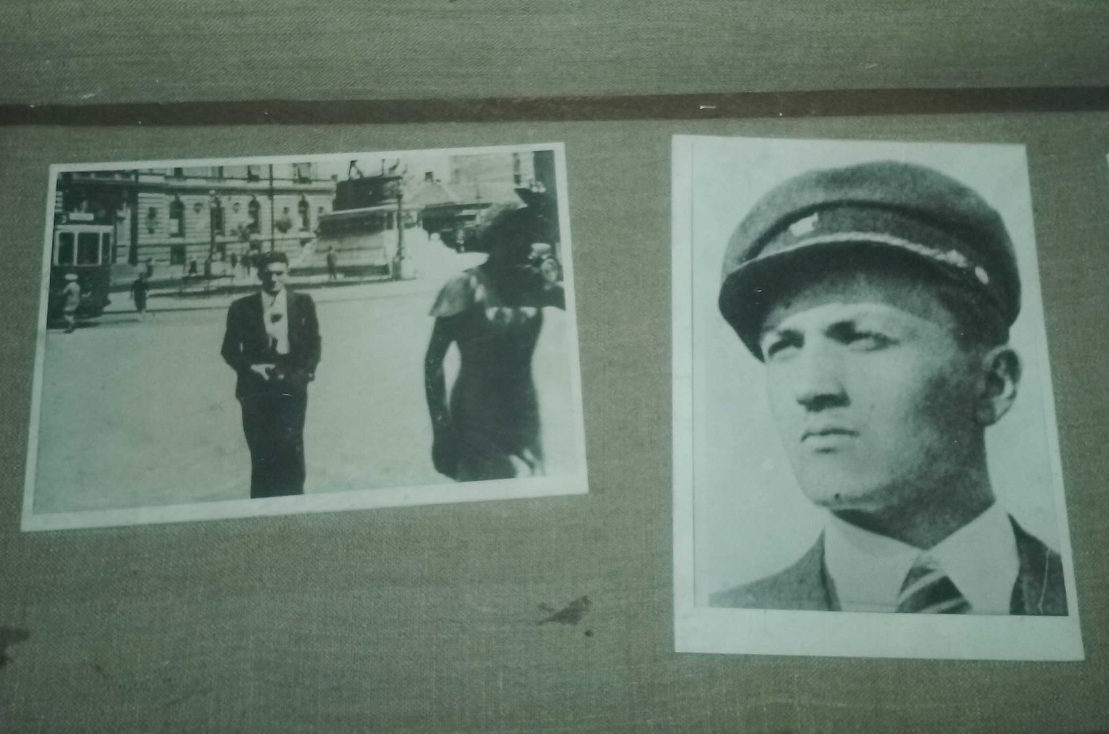 Фотографије Жикице Јовановића Шпанца из сталне поставке Музеја 7. јули 1941. у Белој Црви, код Крупња.